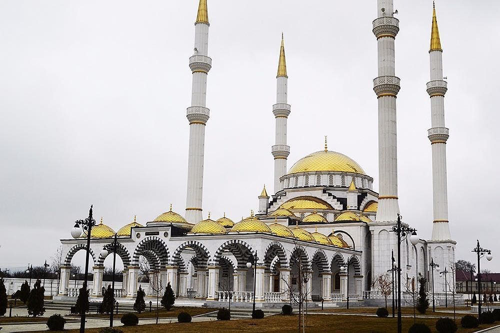 Мечеть в селе Гелдаган Курчалоевского района Чеченской Республики имени Макки Даудовой